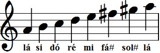 Arquivo montado no MuseScore e editado no Paint.